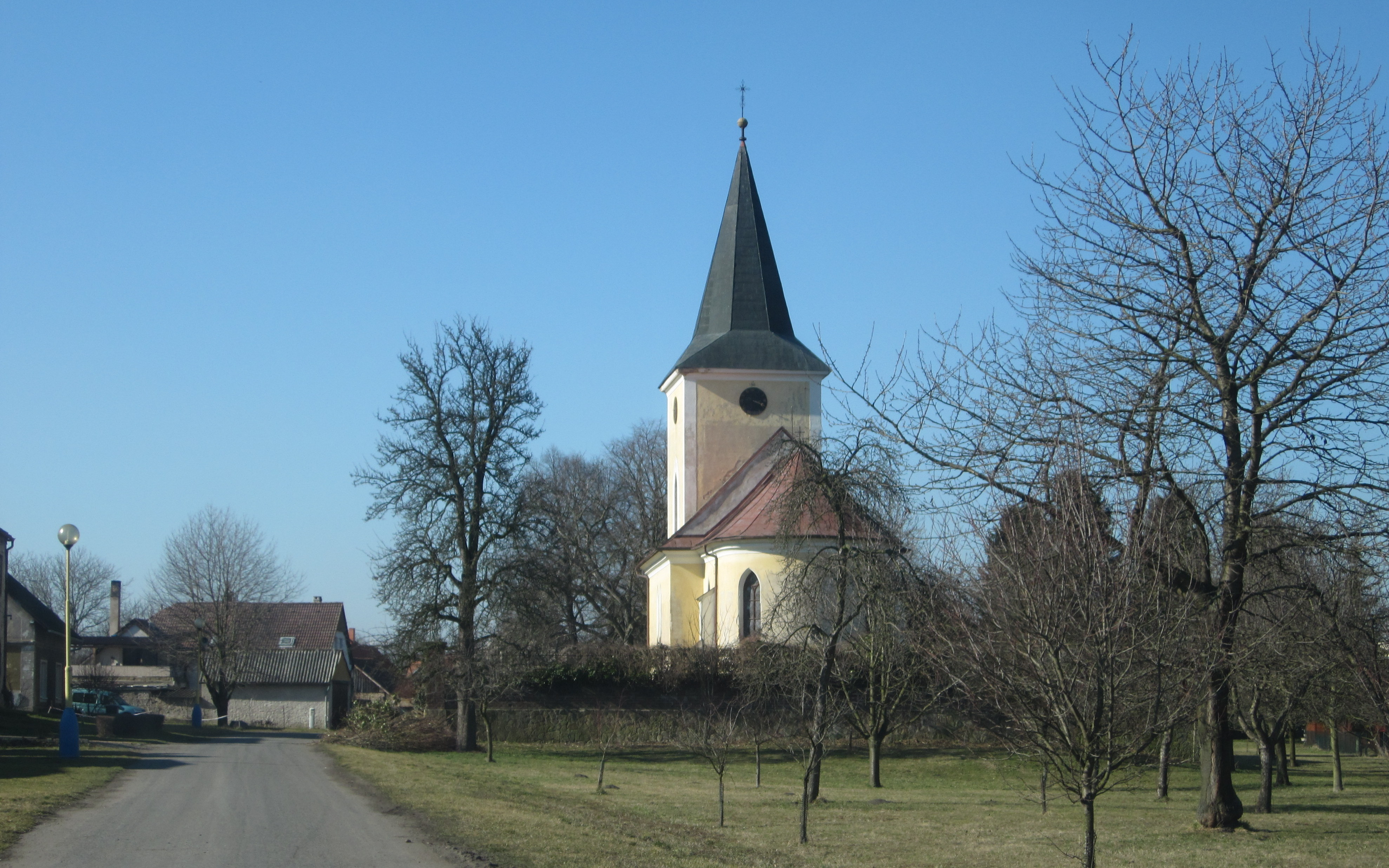 Úmyslovice